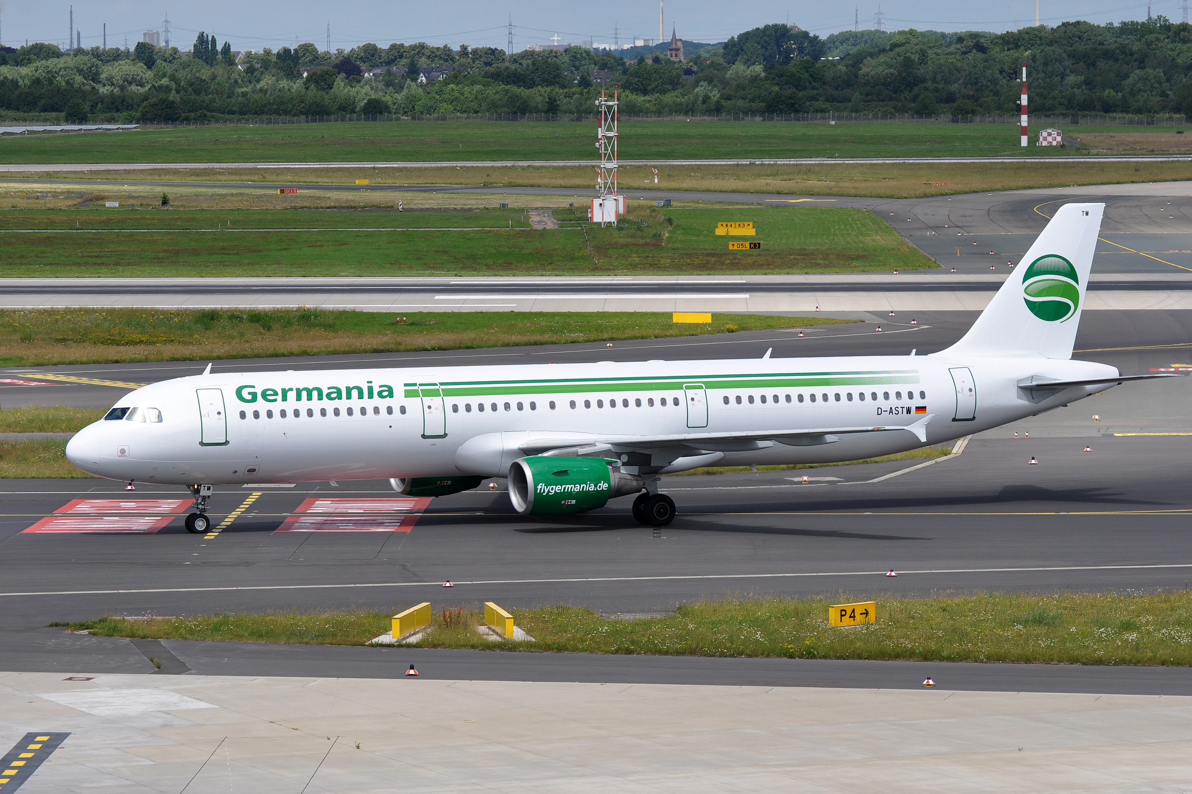 MSN 970 A321-211 GERMANIA DUS EX SABENA AS OO-SUA / NOUVELAIR AS TS-IQA